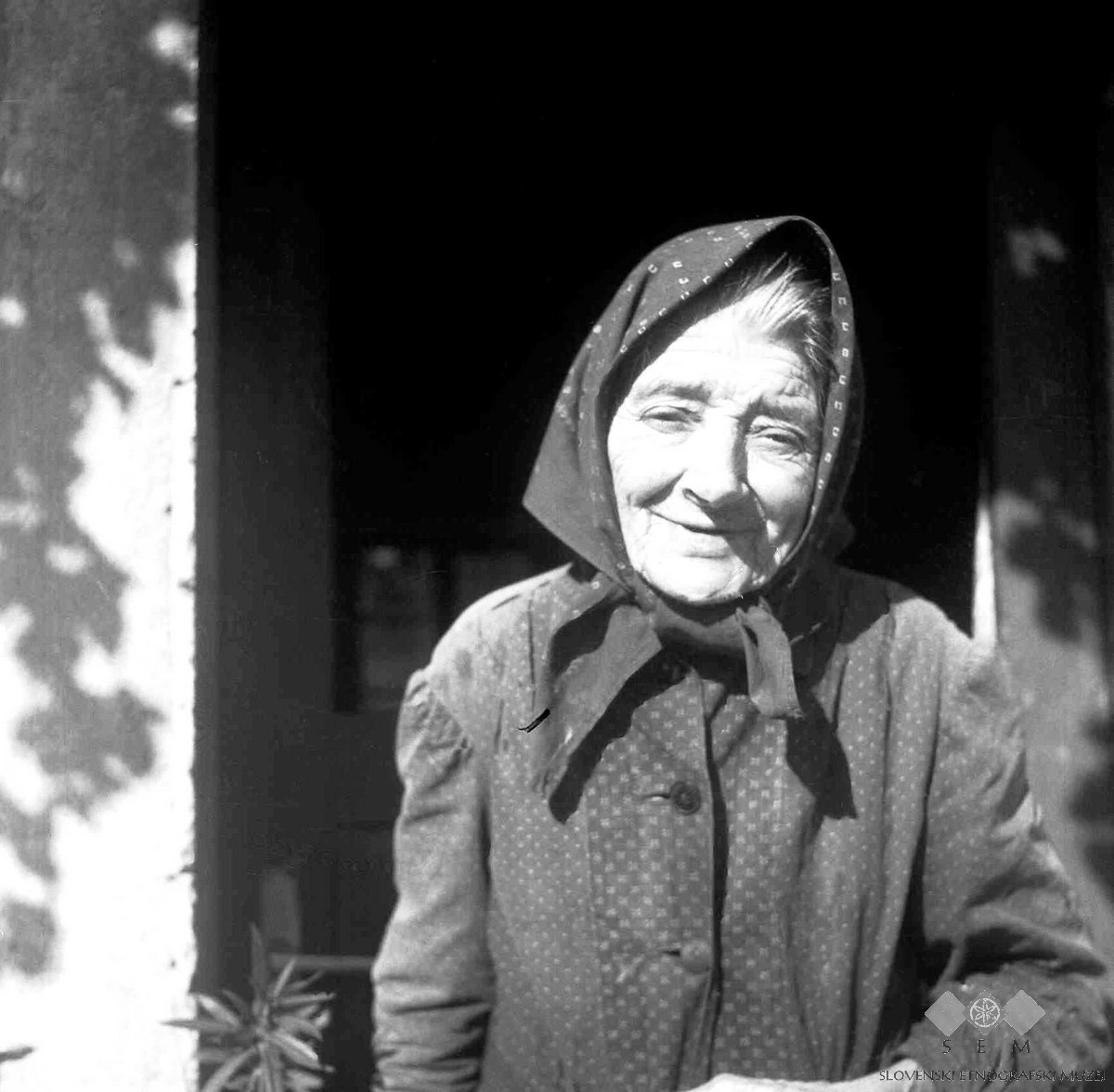 Žnidarjeva Metka, pravljičarka.